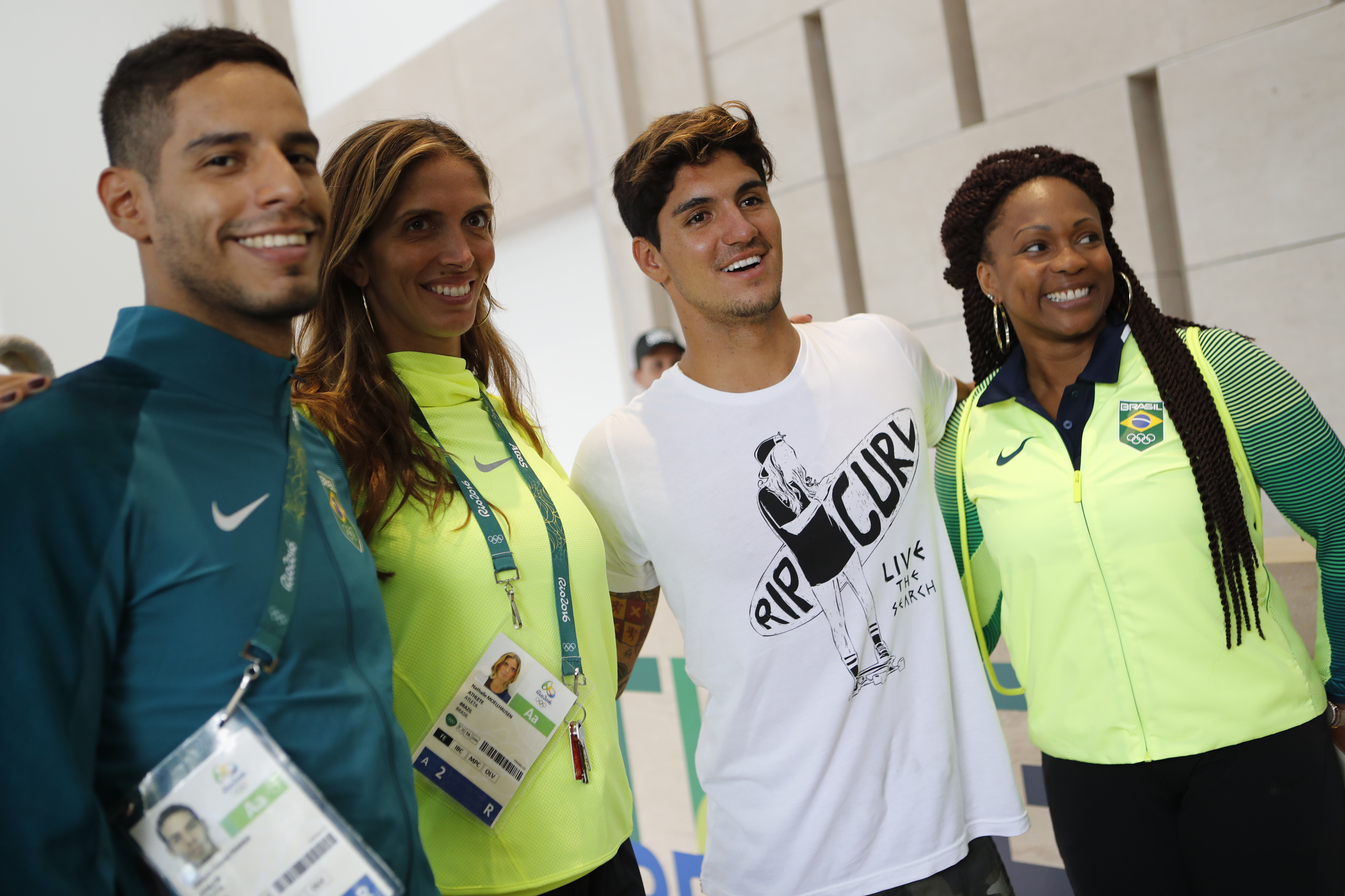 Rio de Janeiro - O campeão mundial de surfe Gabriel Medina visita atletas do Time Brasil na Vila Olímpica dos Jogos Rio 2016 (Fernando Frazão/Agência Brasil)